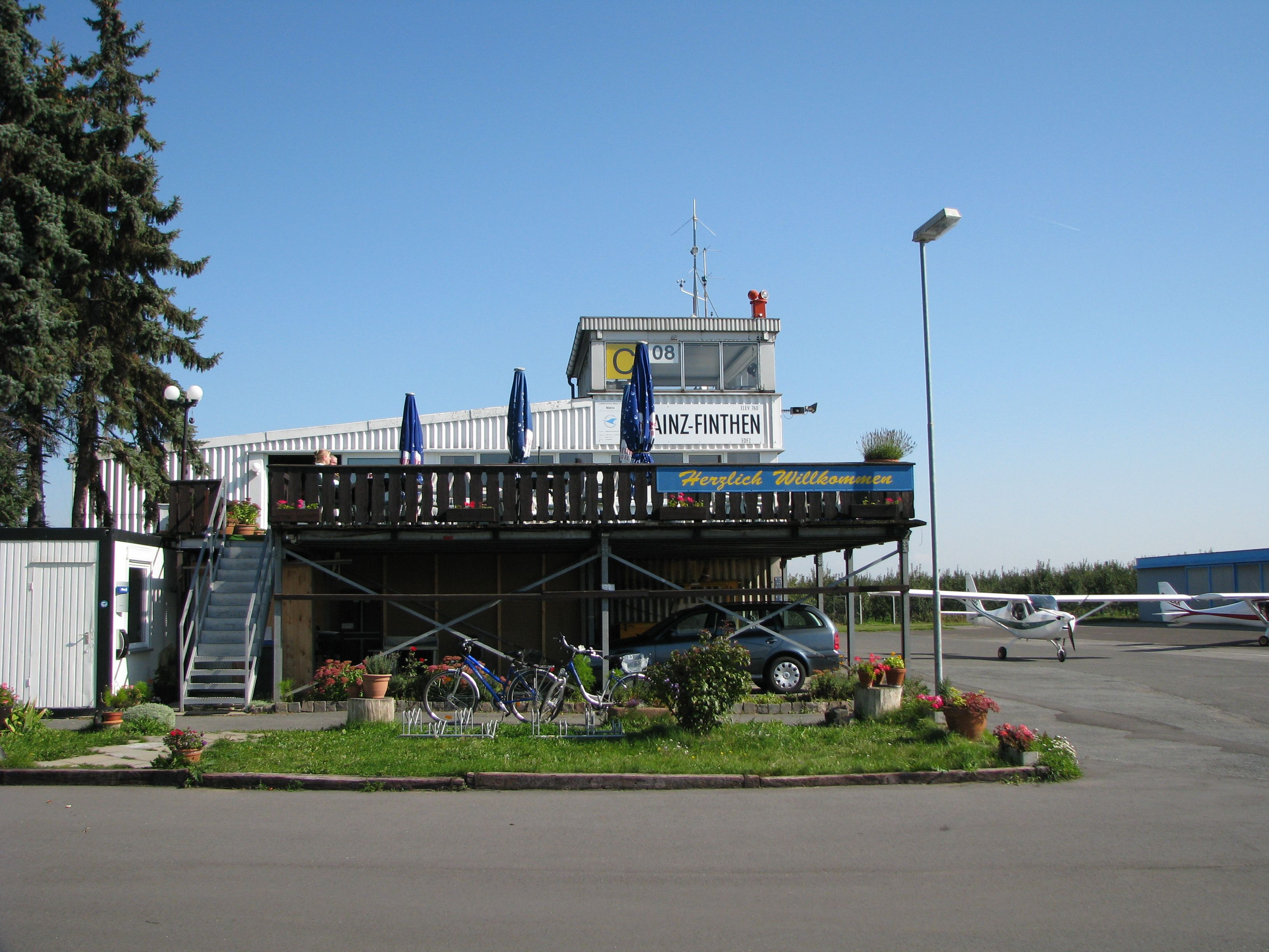 Flugplatz Mainz-Finthen Betriebs GmbH Verkehrslandeplatz EDFZ Luftfahrtverein Mainz e. V. Foto 2008 Wolfgang Pehlemann Wiesbaden IMG_0023